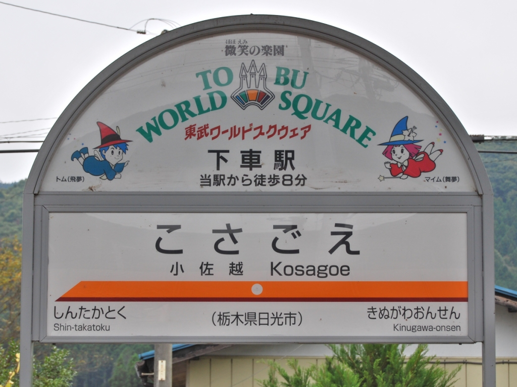 東武鉄道鬼怒川線小佐越駅1番線駅名標（2008/10/26撮影）